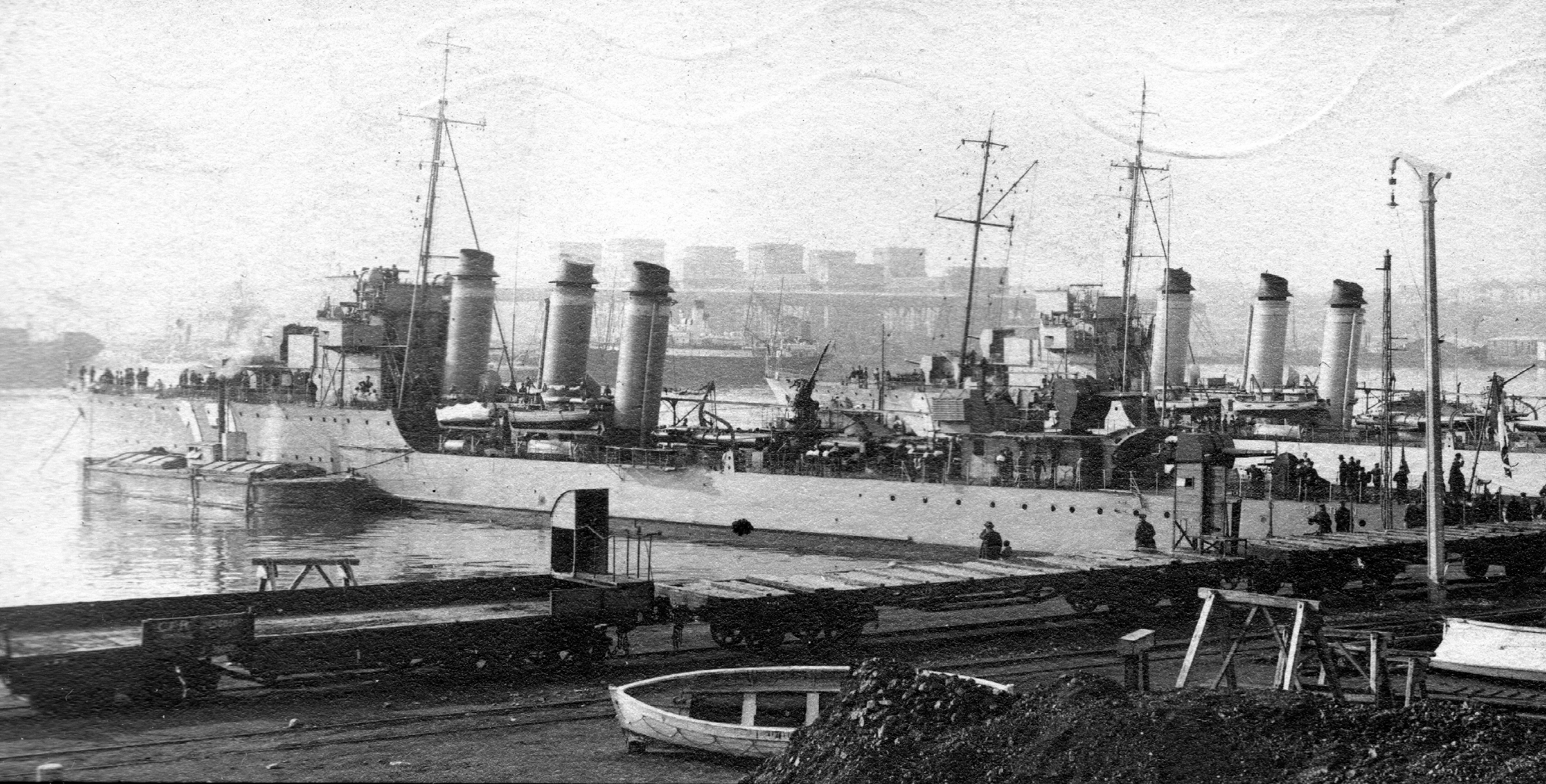 kikötő, a francia haditengerészet két Bourrasque osztályú torpedórombolója. Location: Romania, Constanța Tags: port, warship, steamboat, military Title: kikötő, a francia haditengerészet két Bourrasque osztályú torpedórombolója.